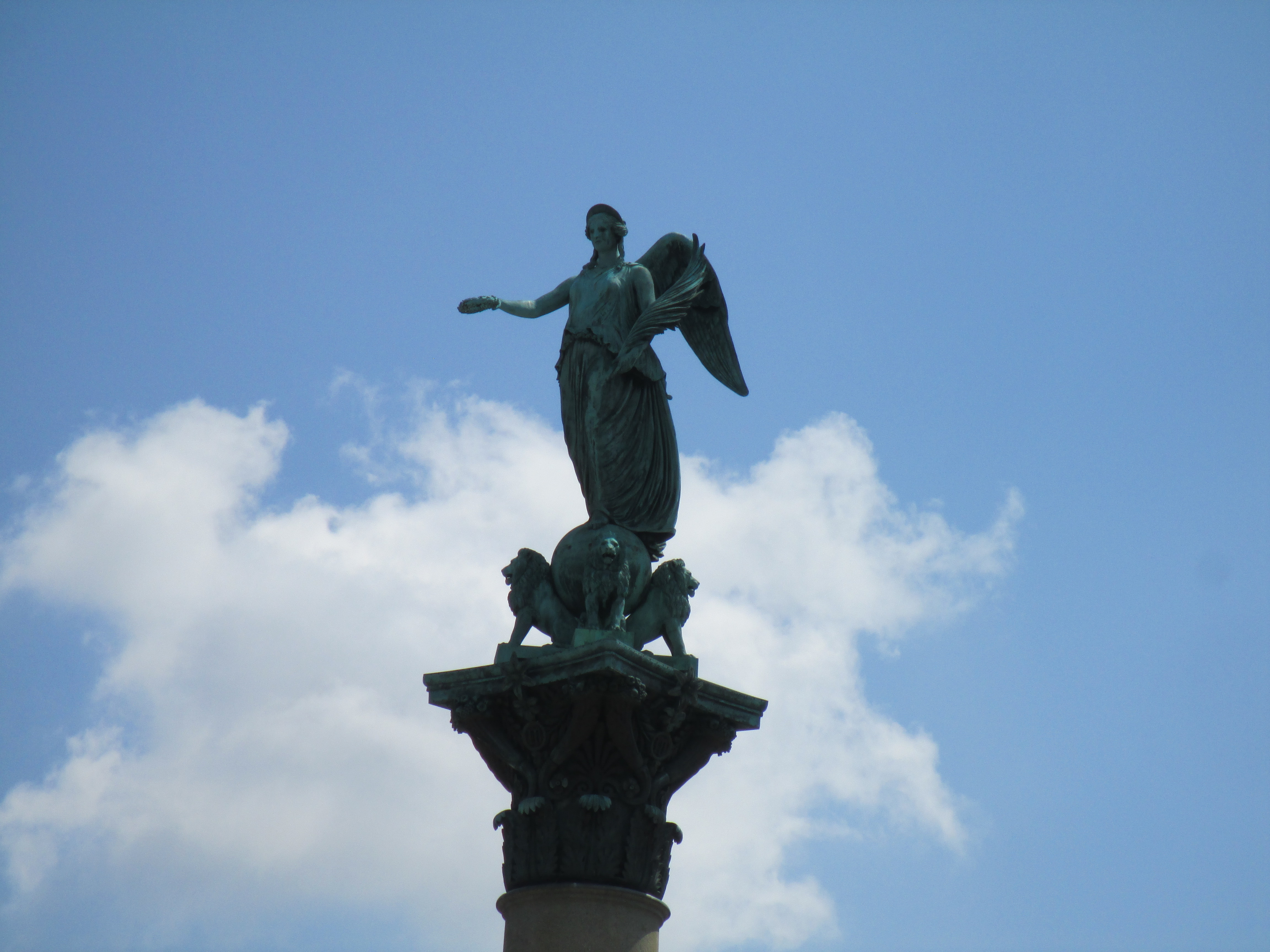 פסל קונקורדיה בשטוטגרט